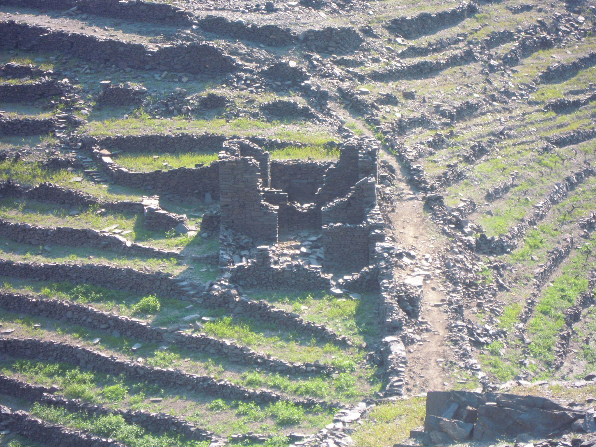 Construción e camiño amurado na entrada de Castro Candaz.